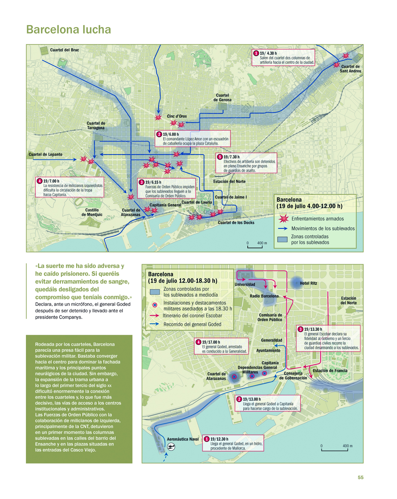 Infografías que narran los combates ocurridos en Barcelona el día 19 de julio de 1936. Página 55 del libro "La sublevación", de Víctor Hurtado (DAU, 2011).